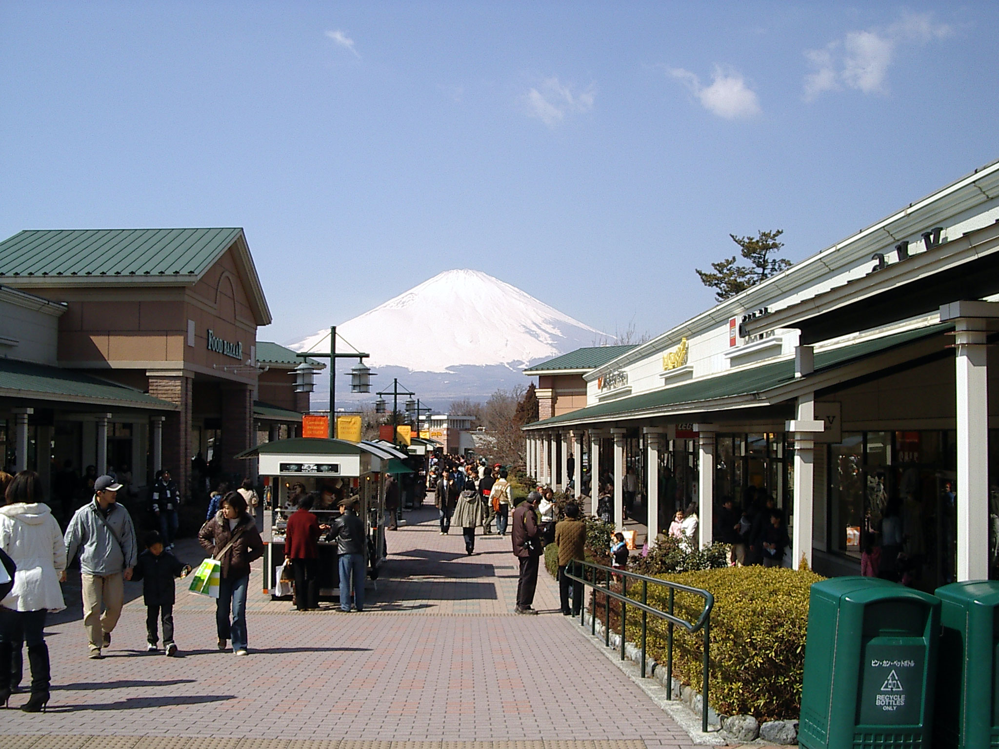 静岡県御殿場市の御殿場プレミアムアウトレット Gotemba Premium Outlets in Gotemba, Shizuoka, Japan